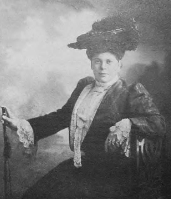 Елизавета Павловна Ребиндер, ур. графиня Кутайсова (1875—1916)